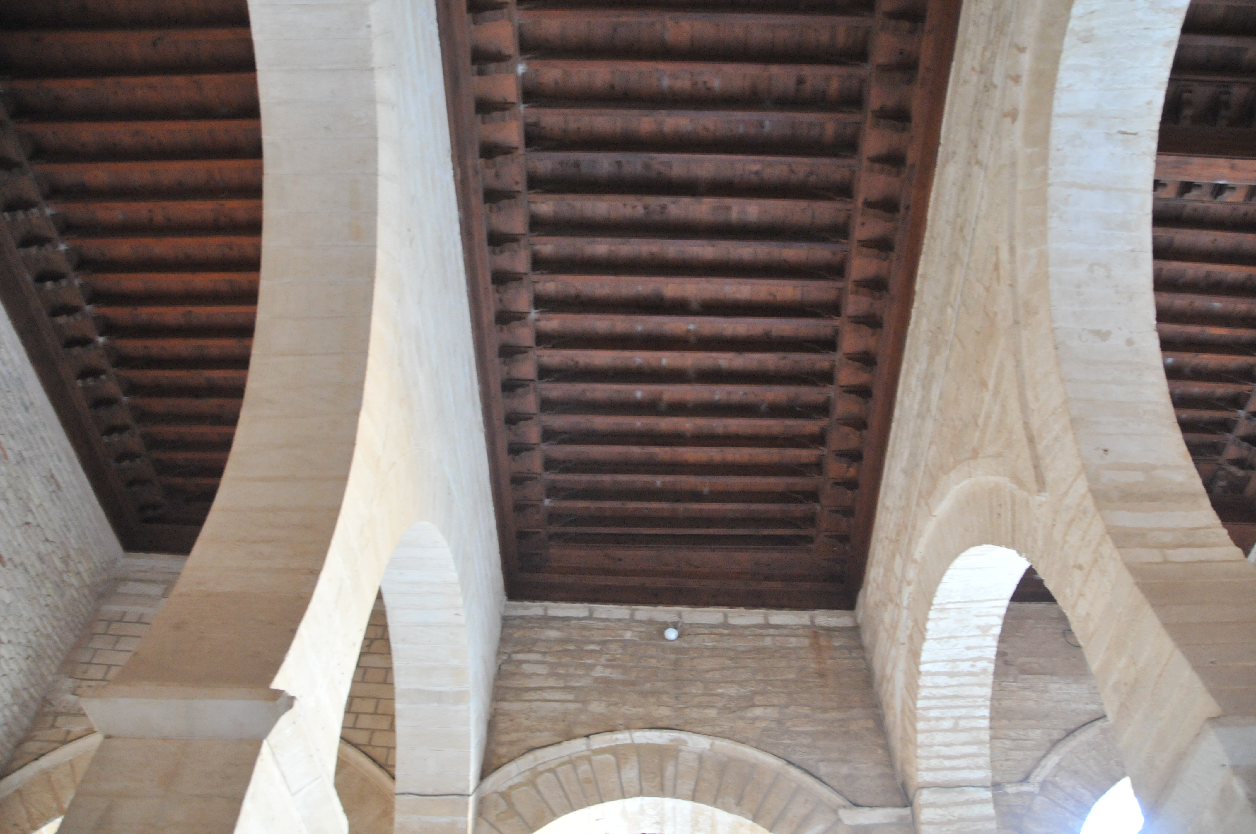 Plafonds de l'une des galeries de la cour de la Grande Mosquée de Kairouan, en Tunisie.